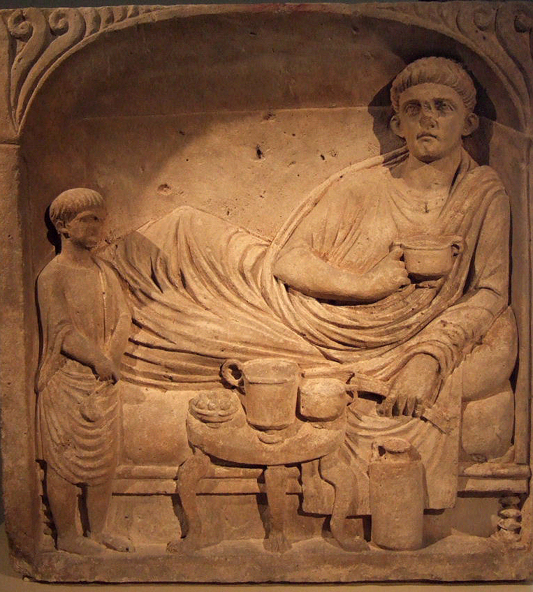 Totenmahl – Anfang des 2. Jahrhunderts n. Chr. Kalkstein Fundort: Bonn – Adenauerallee heutiger Standort: Rheinisches Landesmuseum Bonn